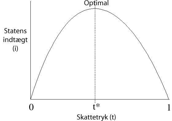 Laffer kurve